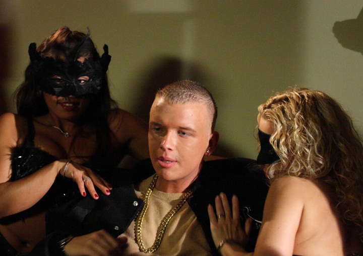 Deutscher Rapper Kollegah